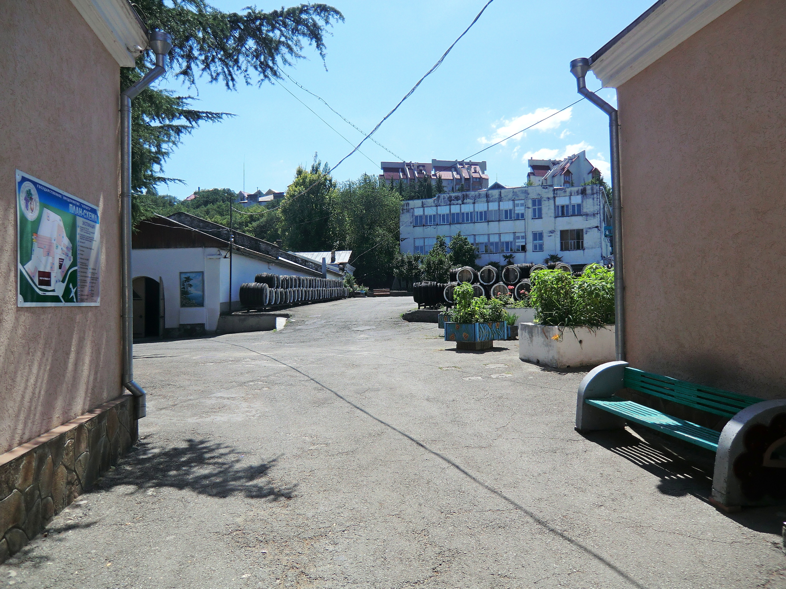 Мадерная площадка винодельческого предприятия «Алушта» (ГП «Алушта») входящего в состав НПАО «Массандра»